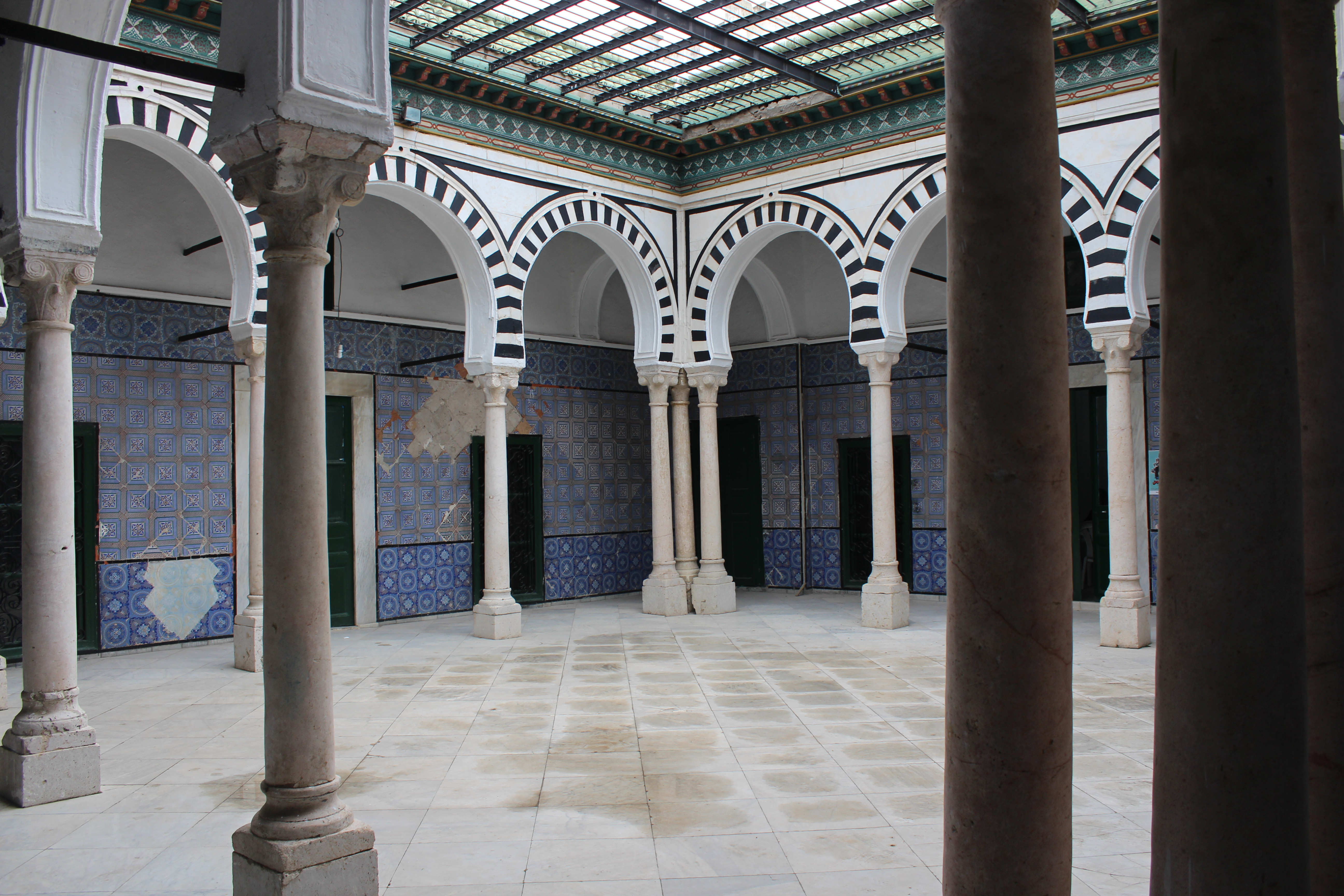 Patio de Dar Lasram 2: siège de l'archive de la Rachidia